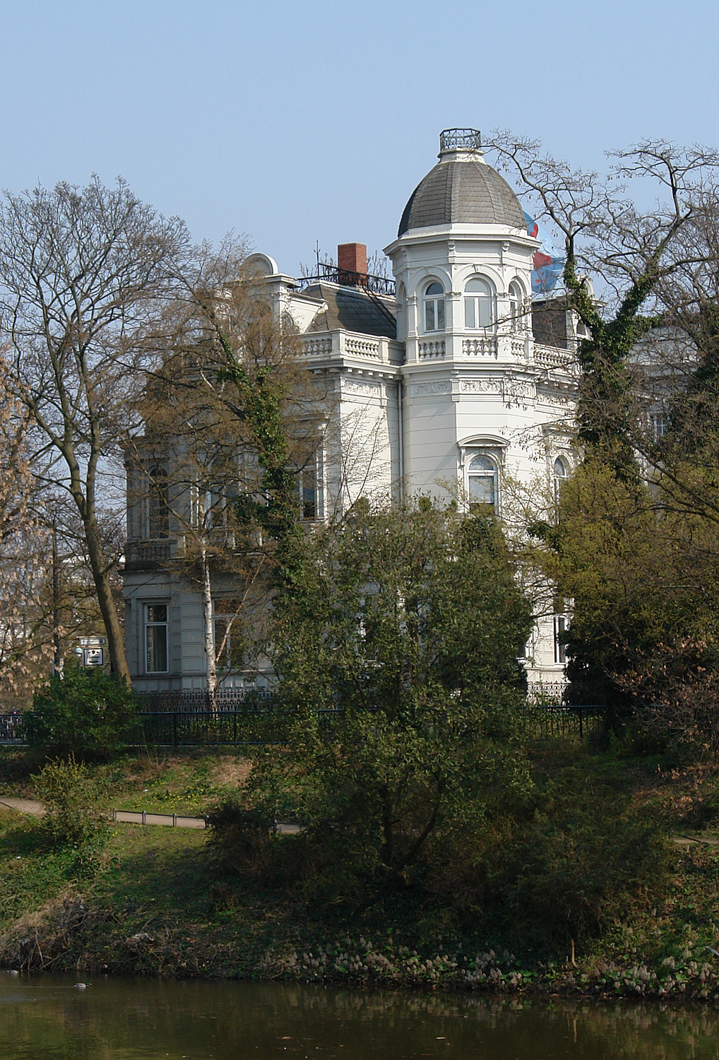 Villa Ichon in Bremen. Blick von den Wallanlagen Das abgebildete Objekt ist ein geschütztes Kulturdenkmal in der Freien Hansestadt Bremen, mit der Nr. 0451 beim Landesamt für Denkmalpflege registriert.